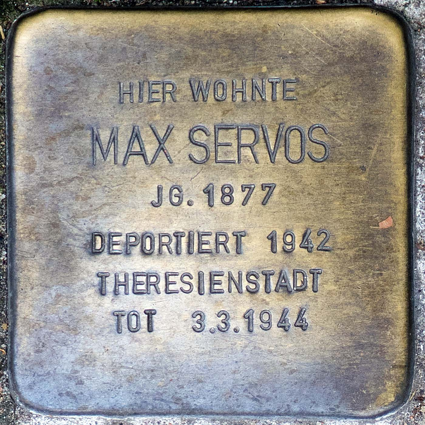 Stolperstein für Max Servos (Willich)